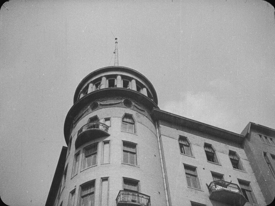 Кадр з фільму "Людина з кіноапаратом